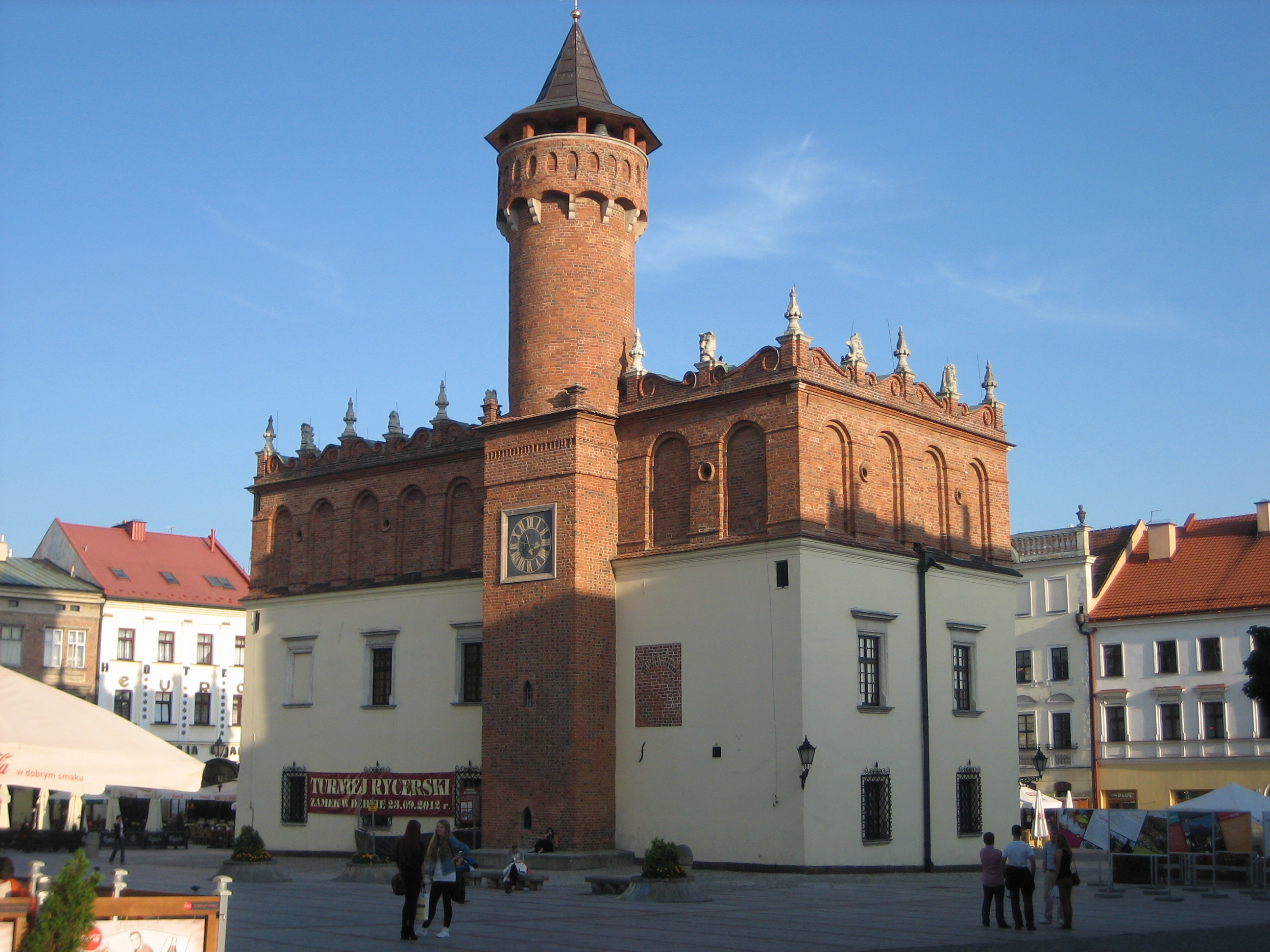 Ratusz w Tarnowie